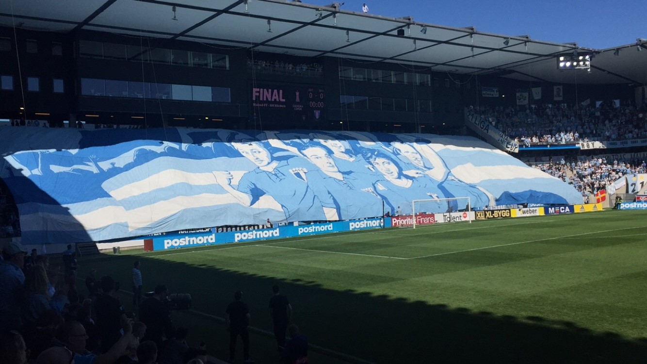 Malmö FF - BK Häcken 2016, Svenska cupen 2015/2016, finalen